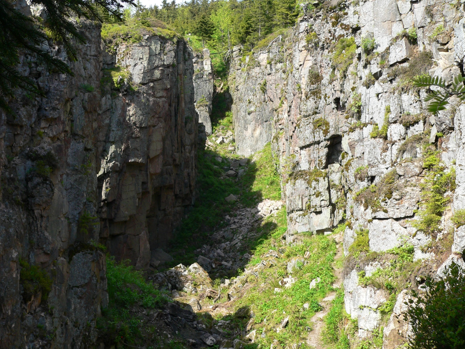 Vlčí jáma (u Horní Blatné).